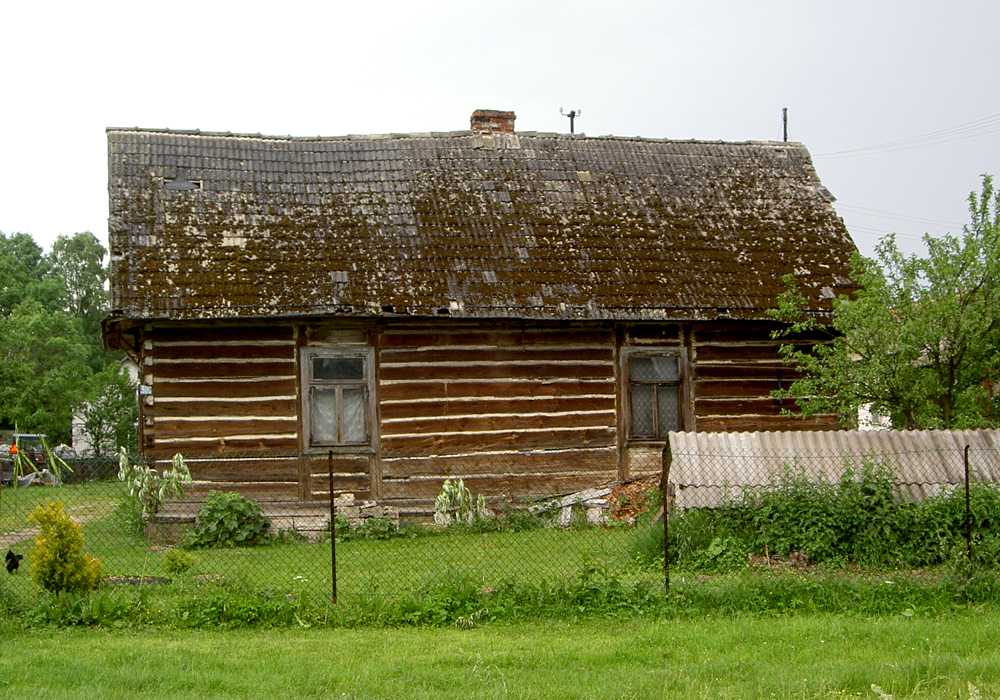 Potok Górny, Poland • Chałupa / Wooden cottage